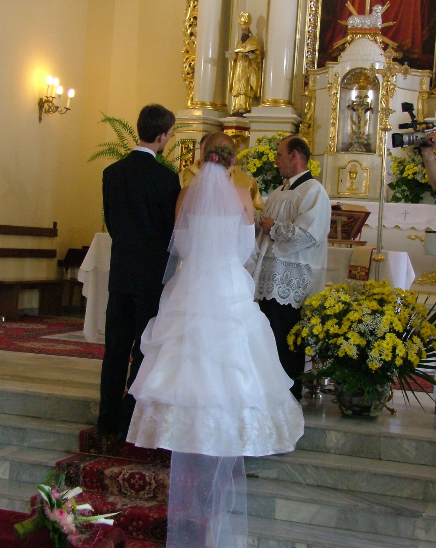 Wedding portraits. Międzyrzec Podlaski.